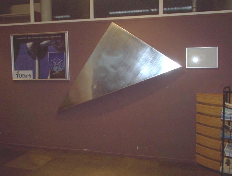 Een stukje van het atomium zoals dit zich tot 2006 in Delft bevond, in het gebouw voor Technische Materiaalwetenschappen, Rotterdamseweg 137. Het gebouw ligt nu plat, het stukje bevindt zich inmiddels aan de Mekelweg 2 in Delft, bouwdeel 8D.